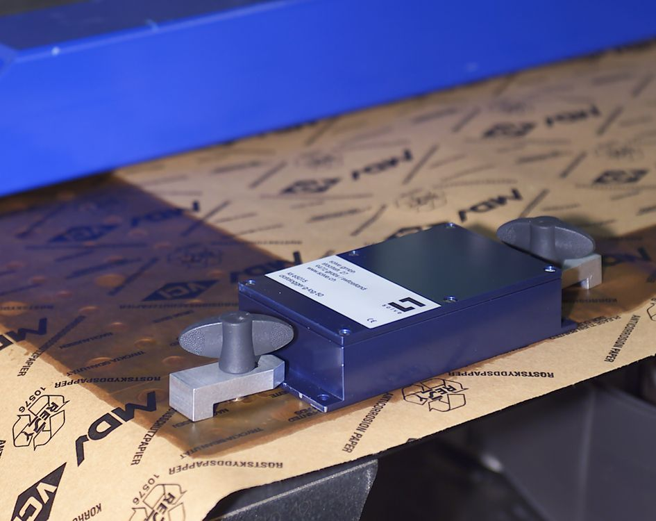 Beschleunigungs-Logger montiert an einem Transporttisch.